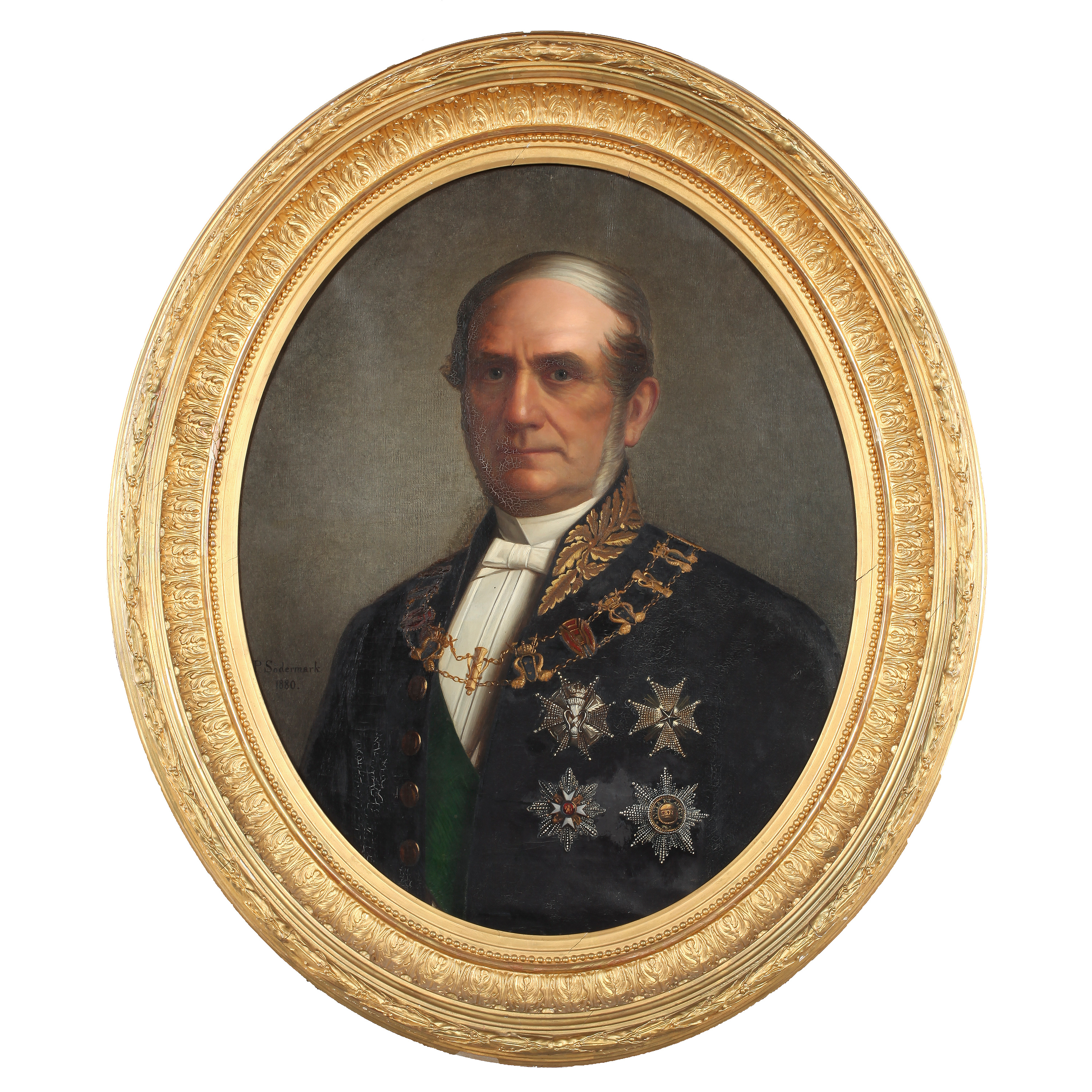 Erik Sparre (1816–1886) var en svensk greve, riksdagsman och landshövding. Iklädd civil ämbetsuniform med Vasaordens kedja runt halsen. På bröstet syns från vänster Vasaordens storkorskraschan, Nordstjärneordens storkorskraschan, Sankt Olavs ordens storkorskraschan, samt österrikiska Järnkroneordens kraschan för en riddare av 1:a klass. Porträtt av Per Södermark år 1880.